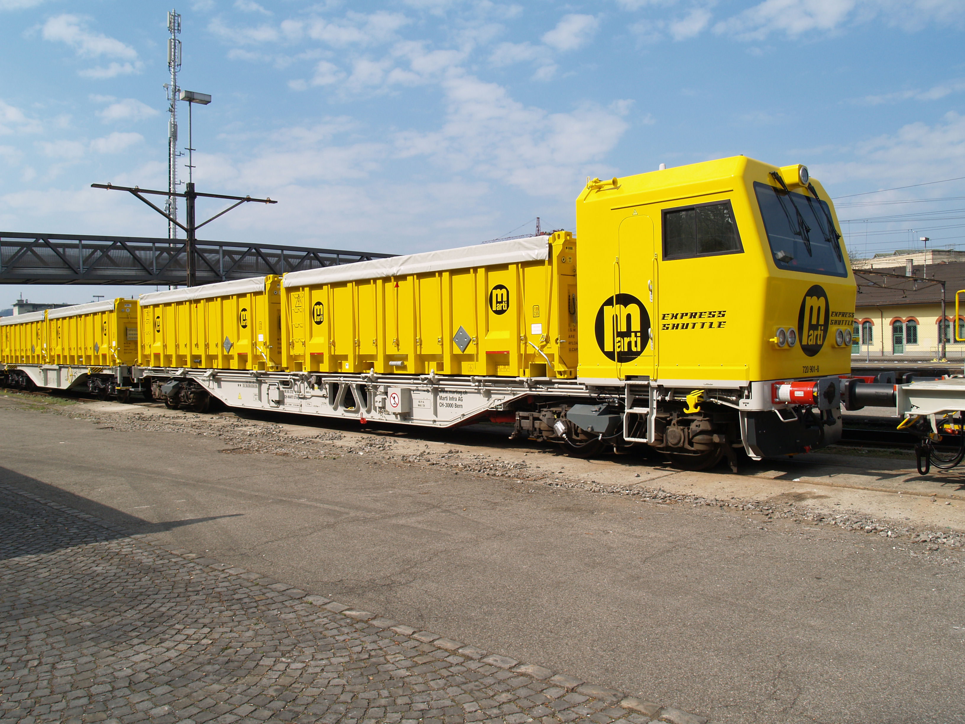 Der Steuerwagen des Cargo-Pendelzug.